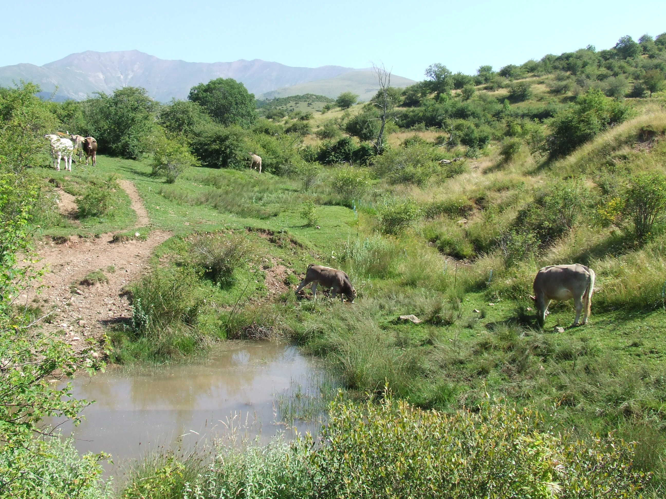 Naixement del barranc de Sant Genís, prop de Larén (Senterada i Sarroca de Bellera, Pallars Jussà)